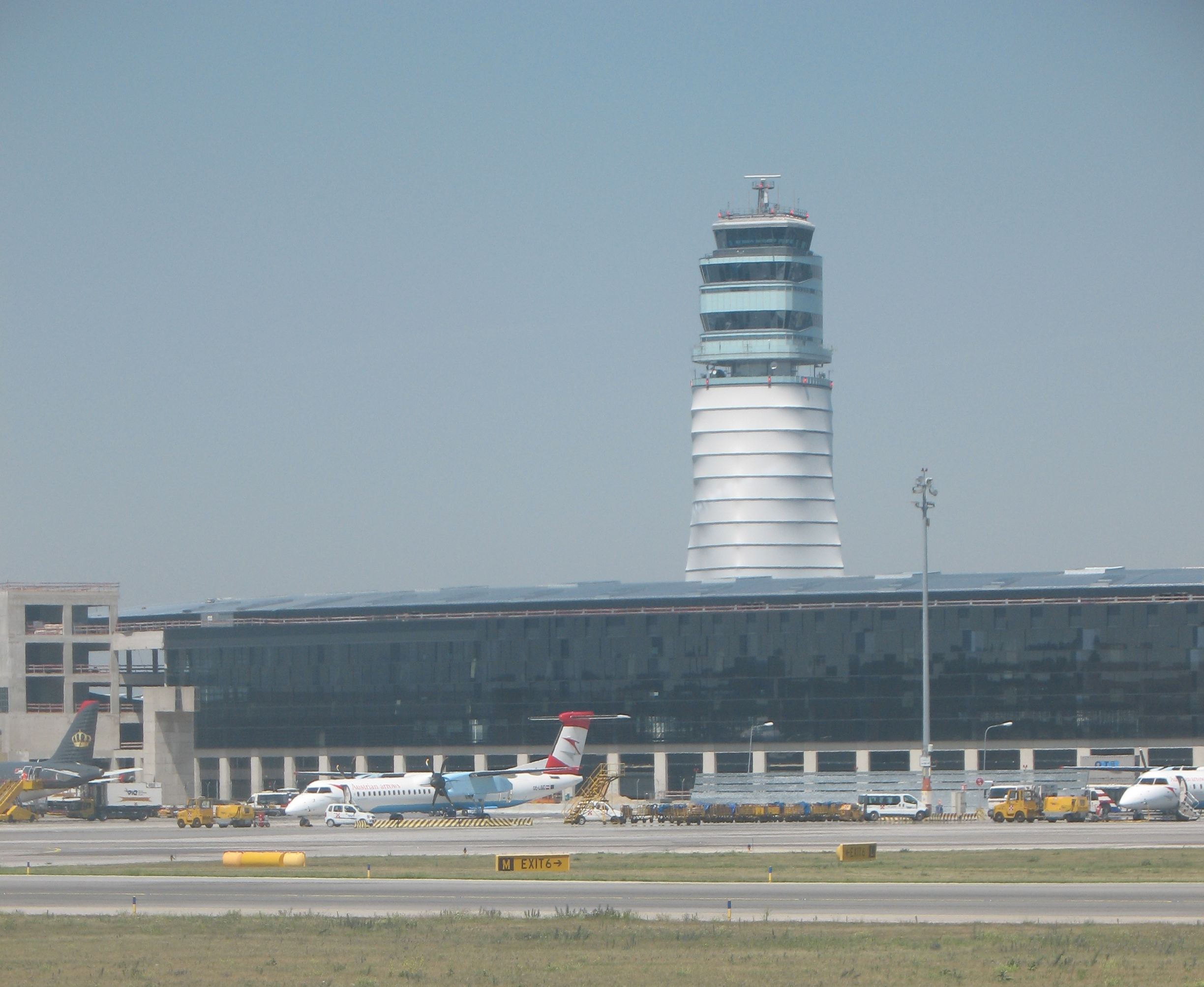 Tower des Flughafens Wien-Schwechat